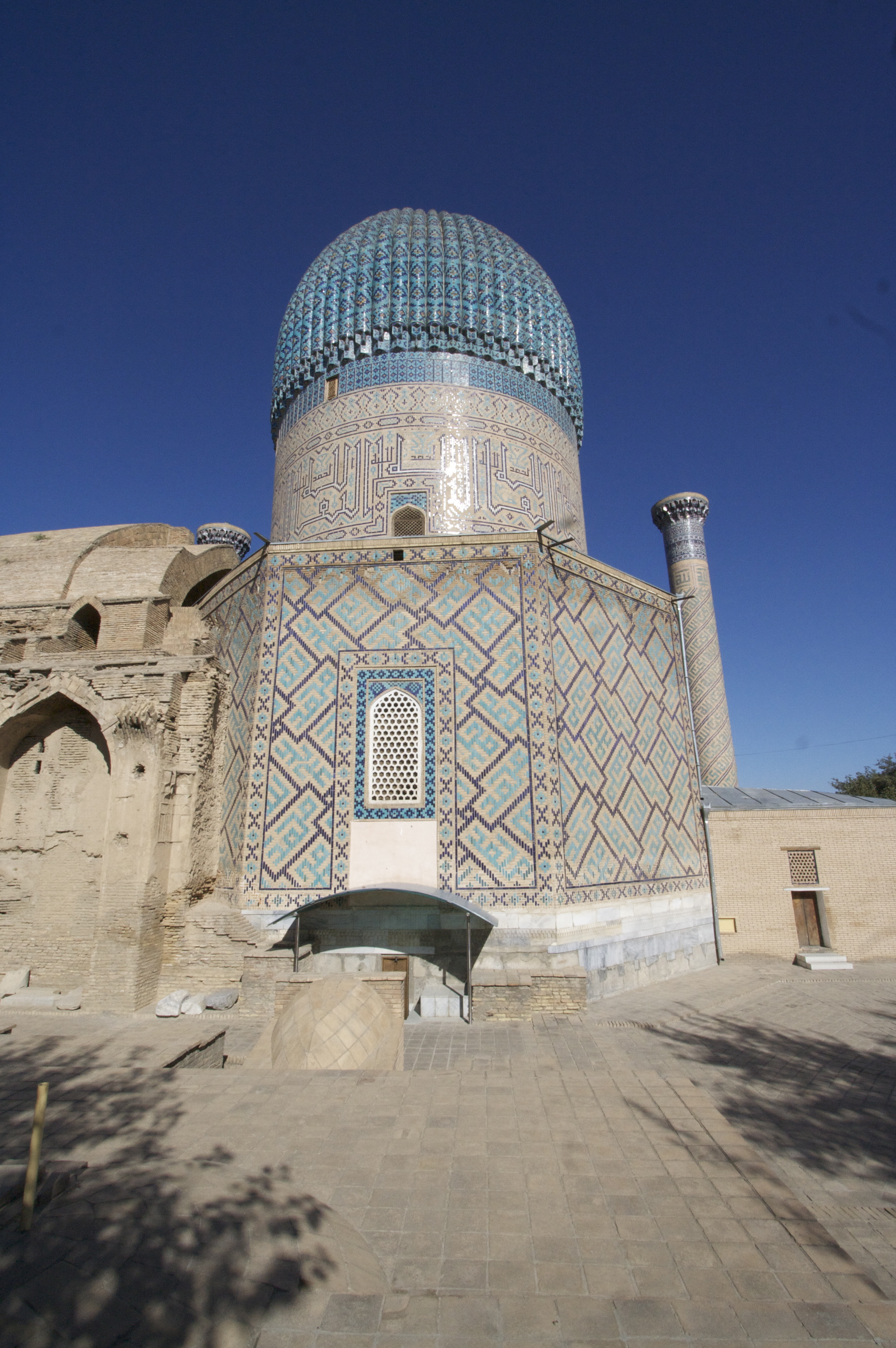 Mausoleo de Gur-e Amir, Samarcanda